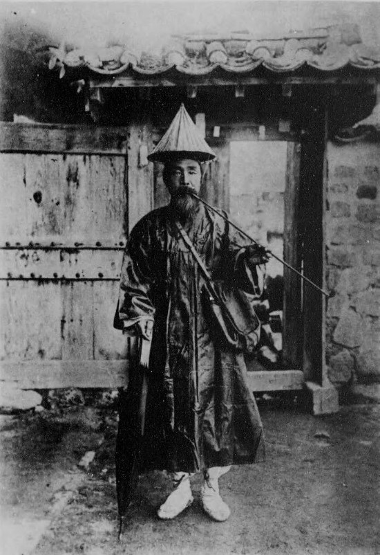 李氏朝鮮時代の郵便集配人 朝鮮写真帖 (朝鮮総督府, 1921)